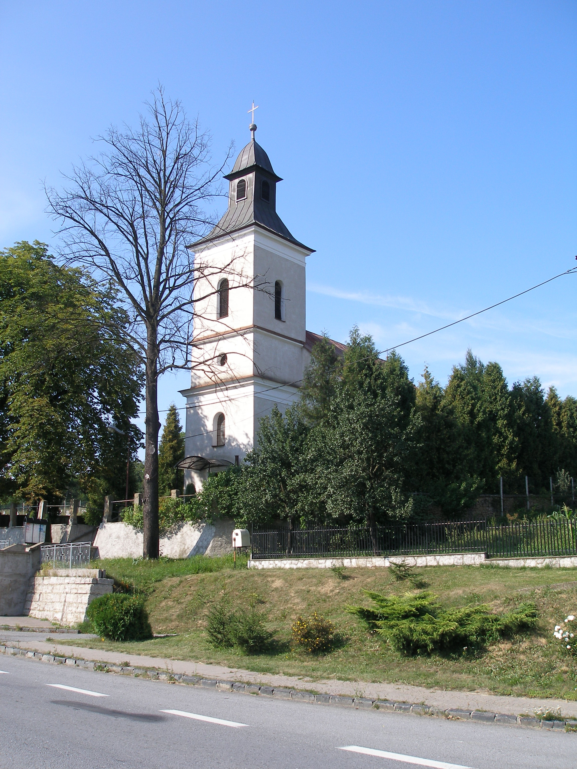 Obec Bertotovce okr.Prešov, región Šariš